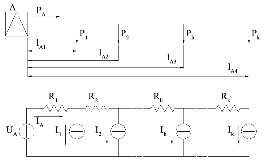 autore: Len zuò descrizione: schema di linea a sbalzo e schema equivalente